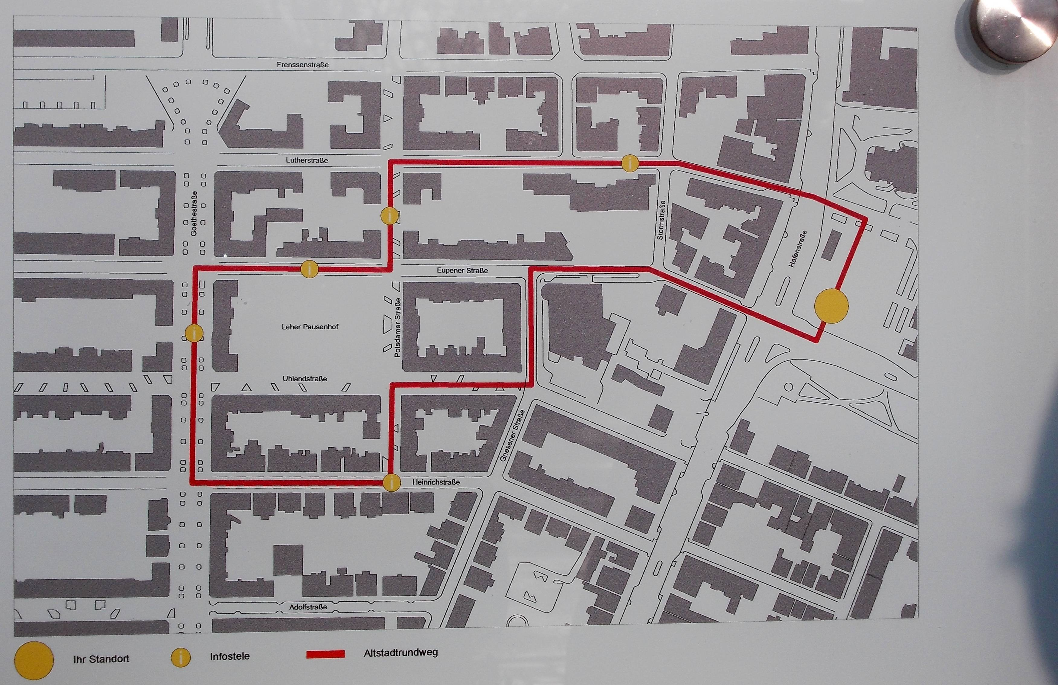 Plan des Altstadtrundgangs Bremerhaven-Lehe, Standort: neben der Bushaltestelle auf dem Ernst Reuter-Platz